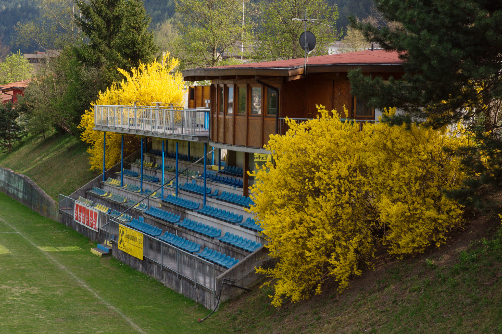 Der Fußballplatz in Inzing, Tirol